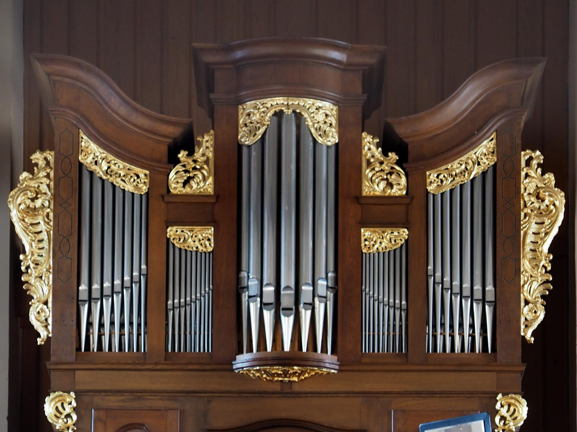 Burgheim a. K. , St. Pankratius, Orgelprospekt, Foto von 2017